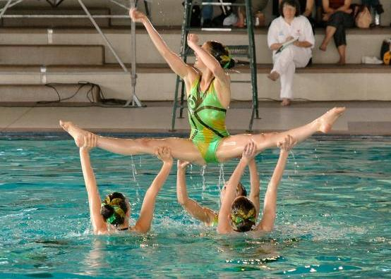 La Natation Synchronisée à Colomiers